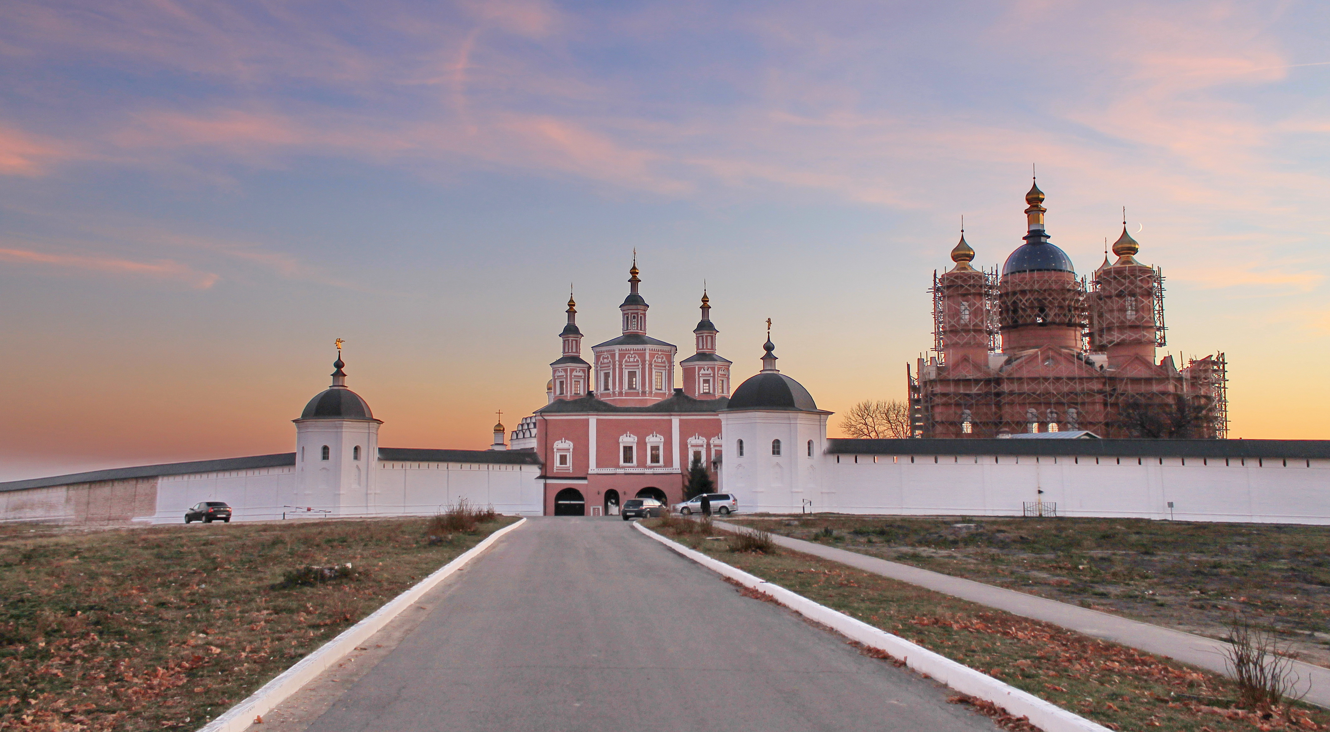 Ансамбль Свенского Успенского монастыря (Брянская область, Брянск, посёлок Супонево)